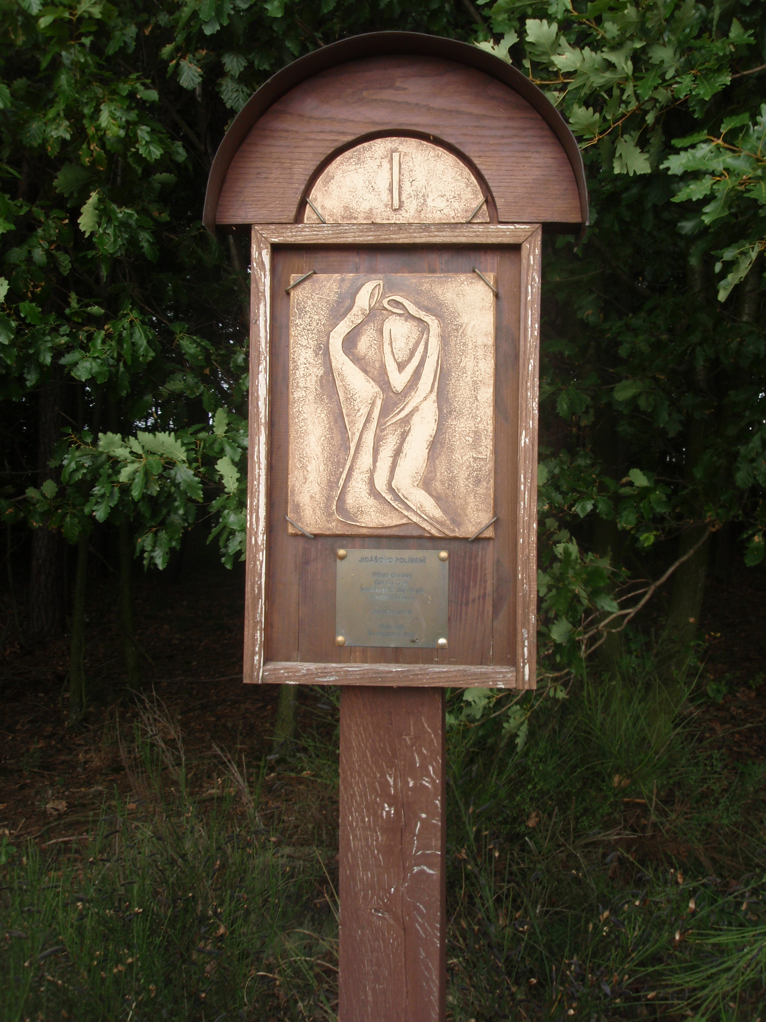 Křížová cesta u Hostišové